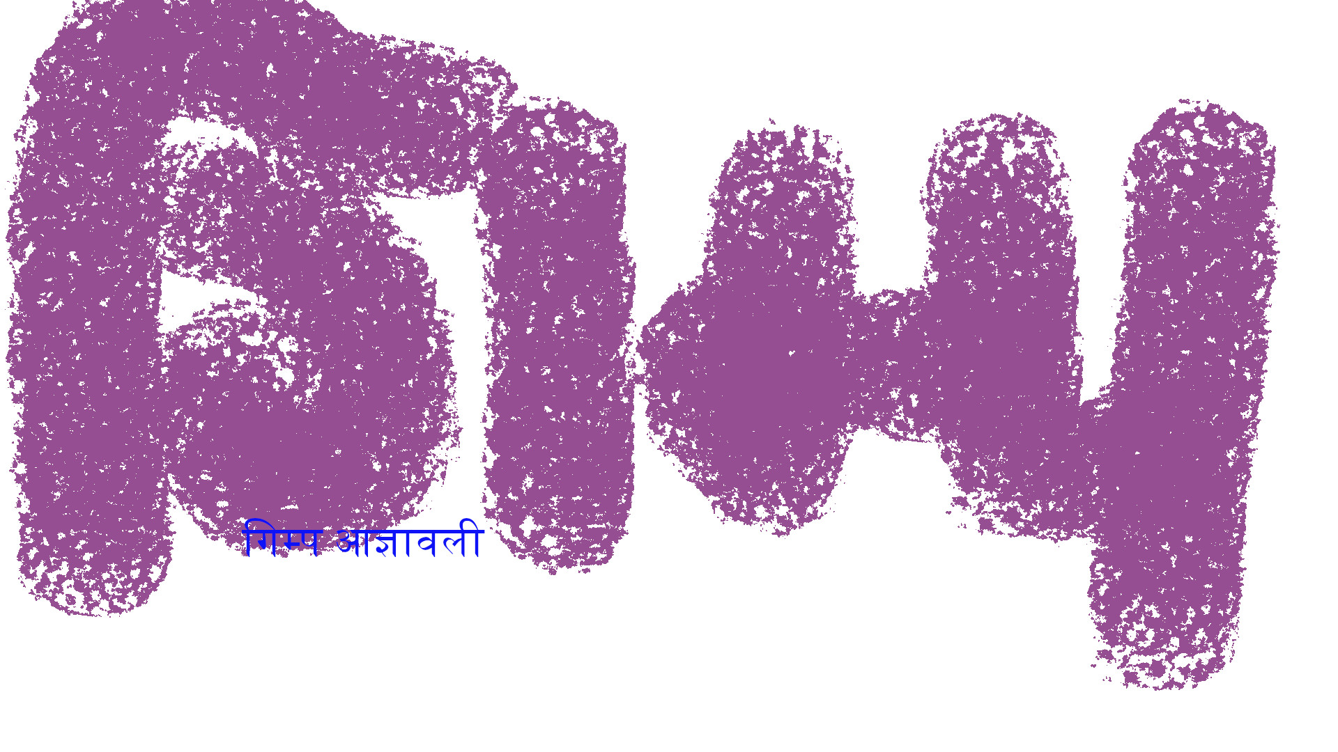 संवादपटल_मजकूर लेखन